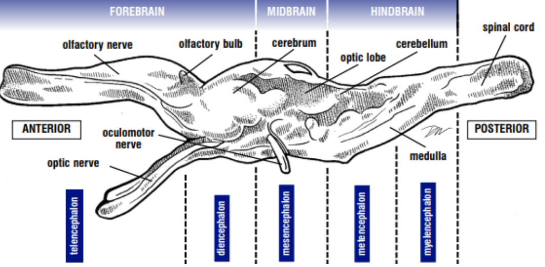 Encéfalo de tartarugas